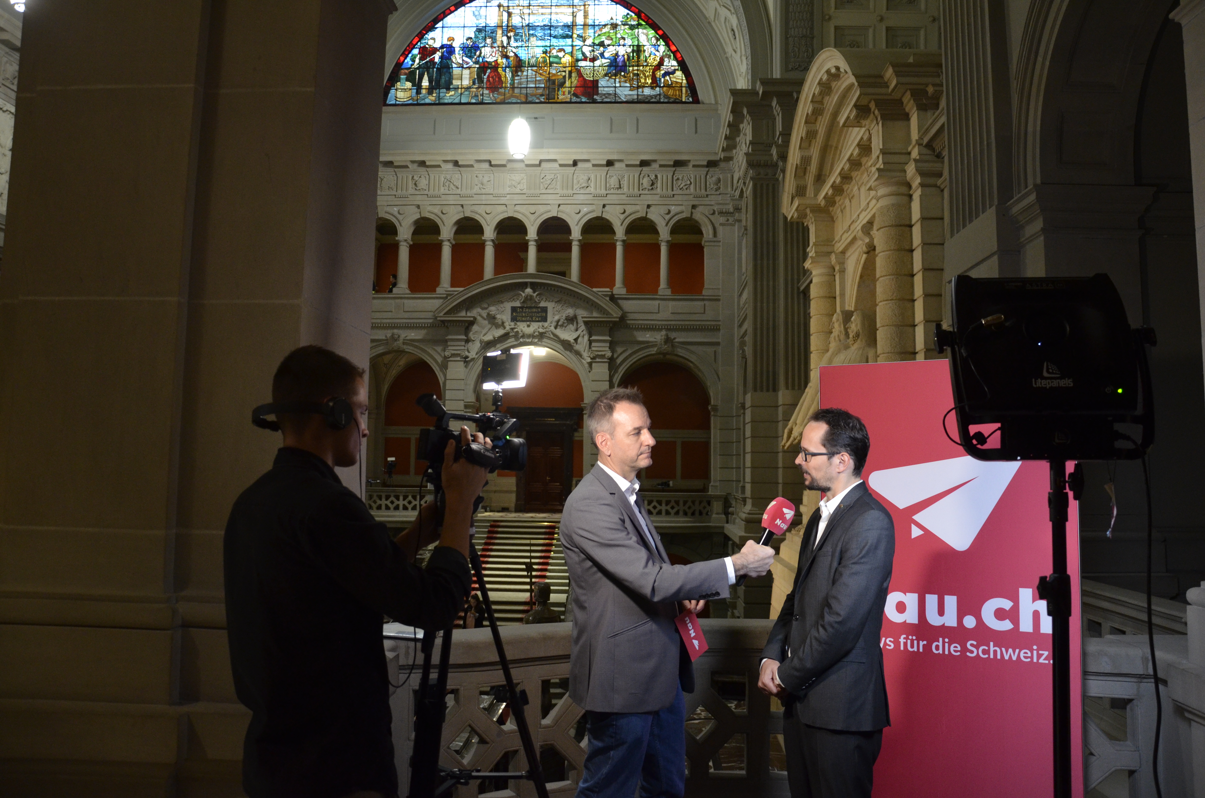 Schweizer Parlamentswahlen 2019: Wahltag im Bundeshaus. Interview mit Balthasar Glättli (Fraktionspräsident Grüne) durch nau.ch in der Kuppelhalle